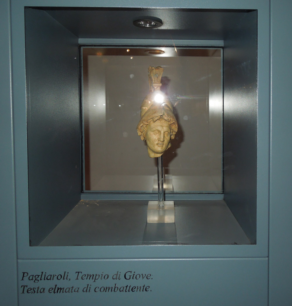 Testa elamta di combattente, esposta presso il Museo archeologico Francesco Savini di Teramo.